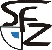 Logo des Schuldnerfachberatungszentrums